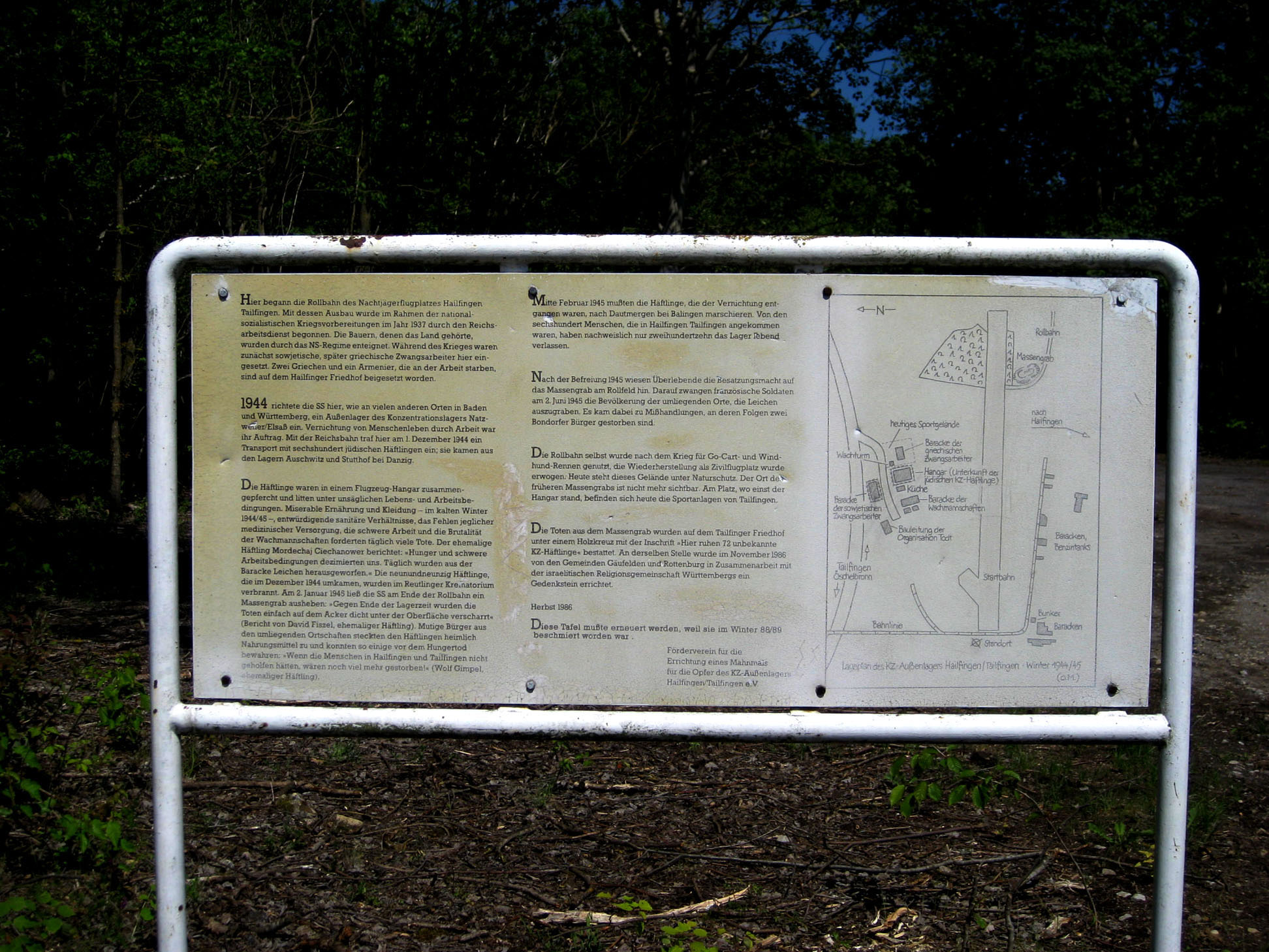 Mahnmal für die Gedenkstätte des KZ-Außenlager Hailfingen/Tailfingen, - alte Informationstafel -, Deutschland, Baden-Württemberg, auf der Kreisgrenze der Landkreise Tübingen und Böblingen